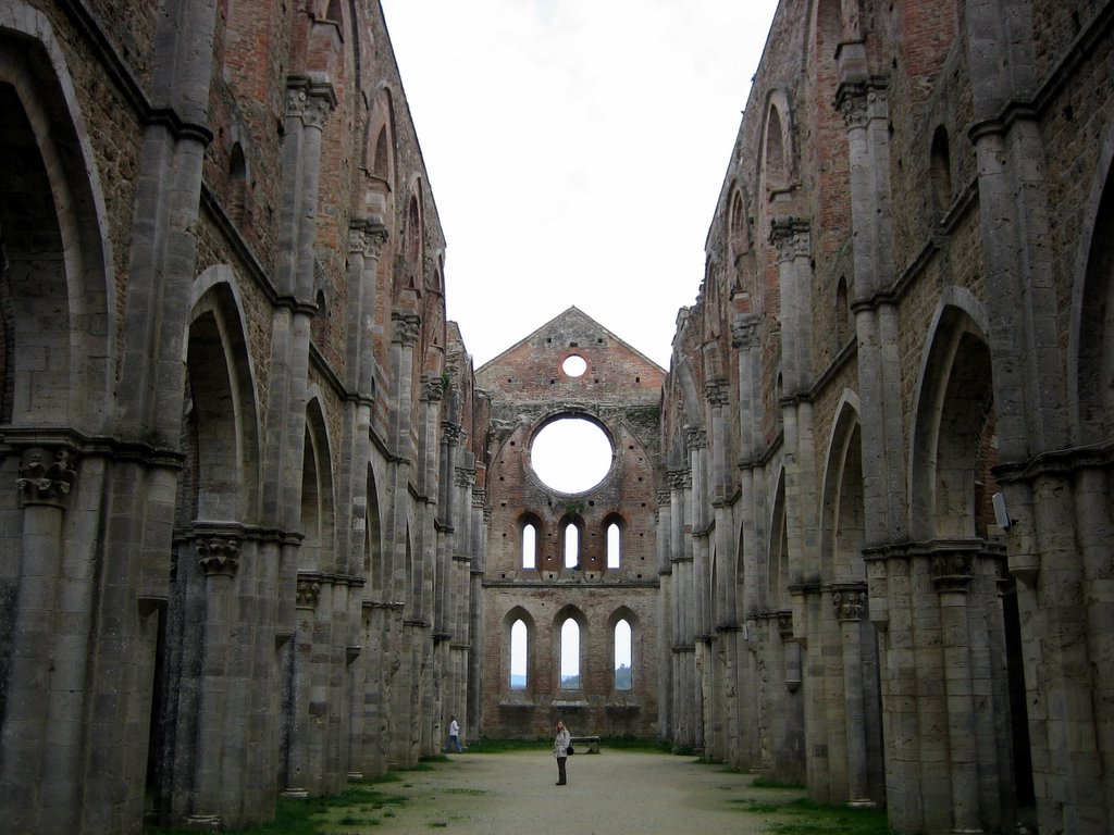 Abbazia di San Galgano, Toscana, Italy